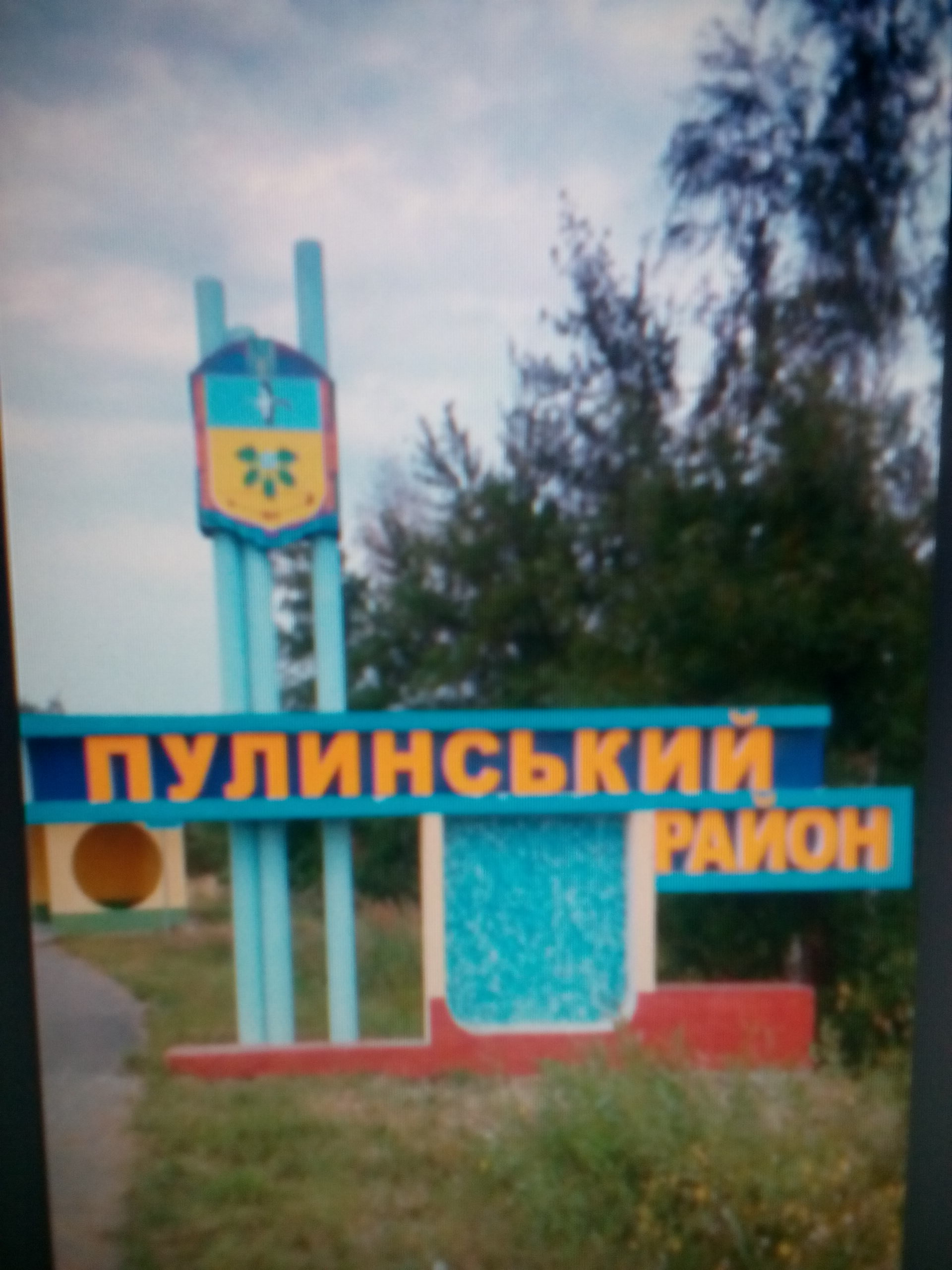 знак